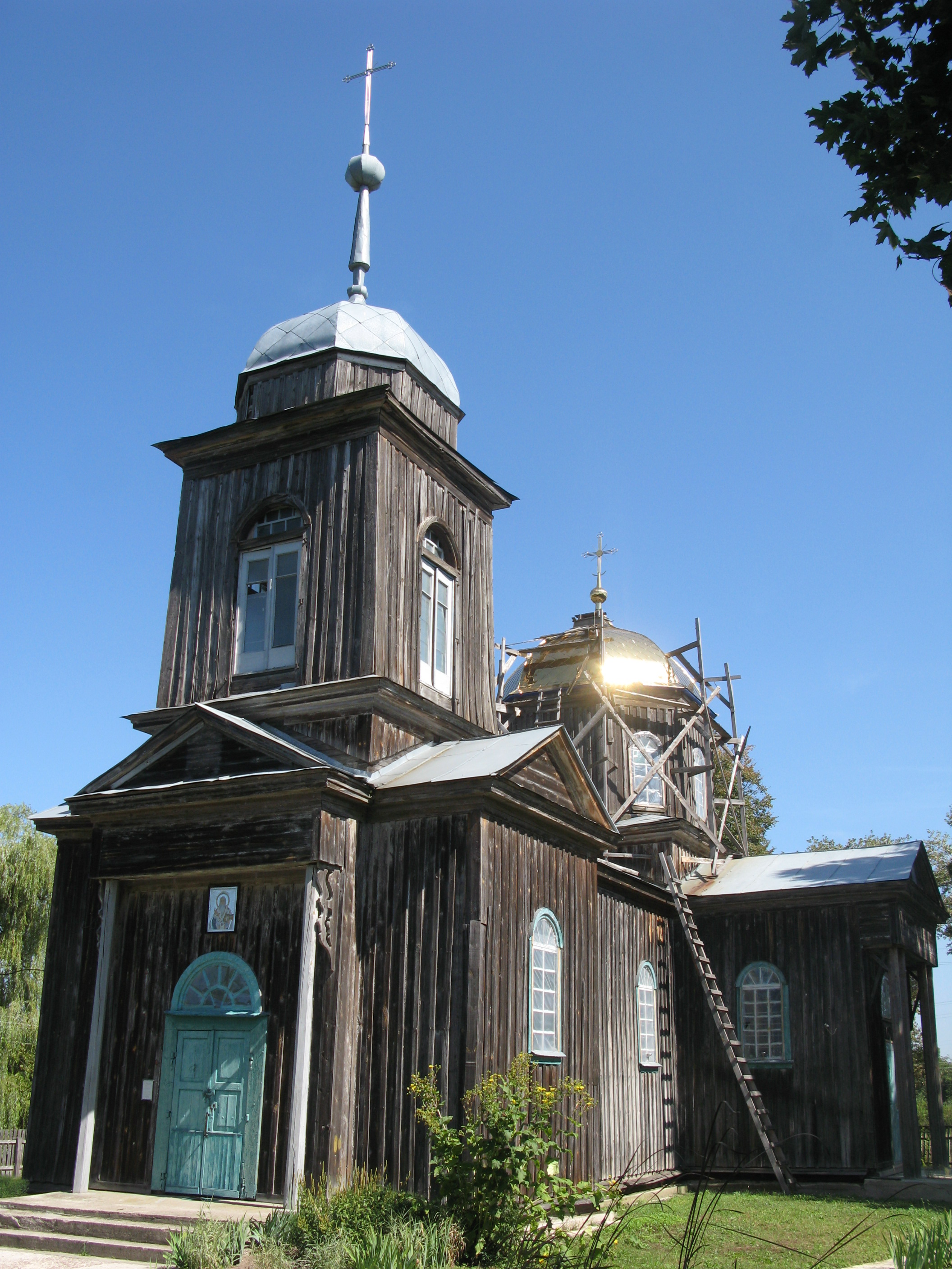 Іоанно-Златоустівська церква (дер.), село Півні